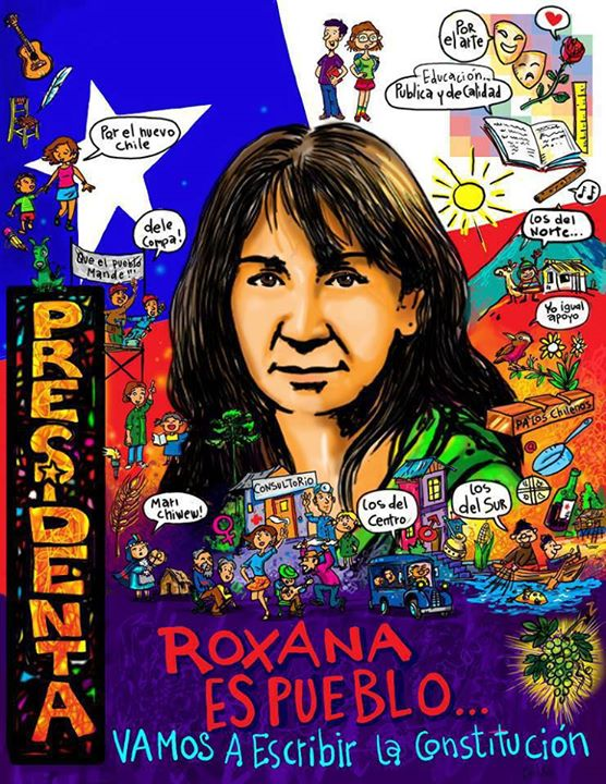 Afiche propagandístico de Roxana Miranda.